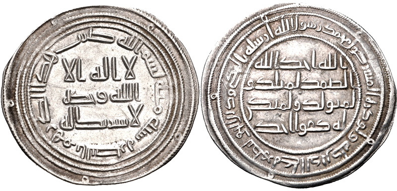 Dirrã do califa Omar II emitido em 718-719